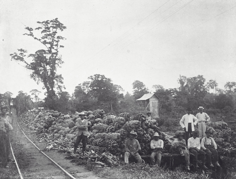 Foto.